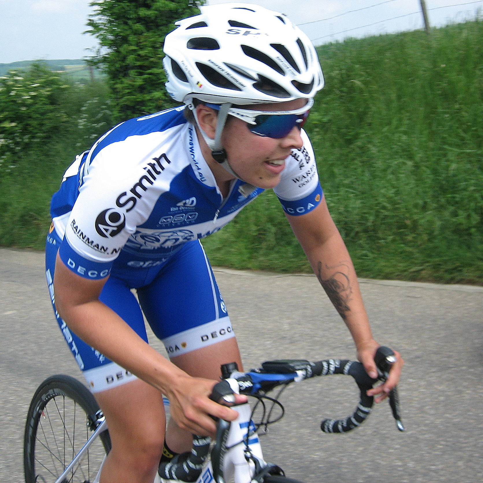 Kim de Baat (Lensworld - Zannata) in Holland Hills Classic 2016